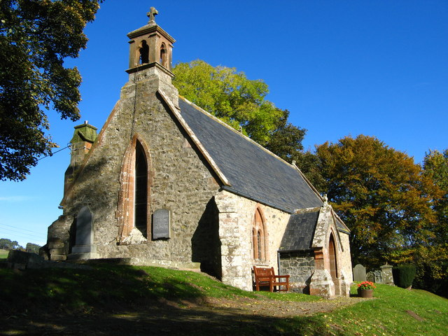 Lyne Kirk